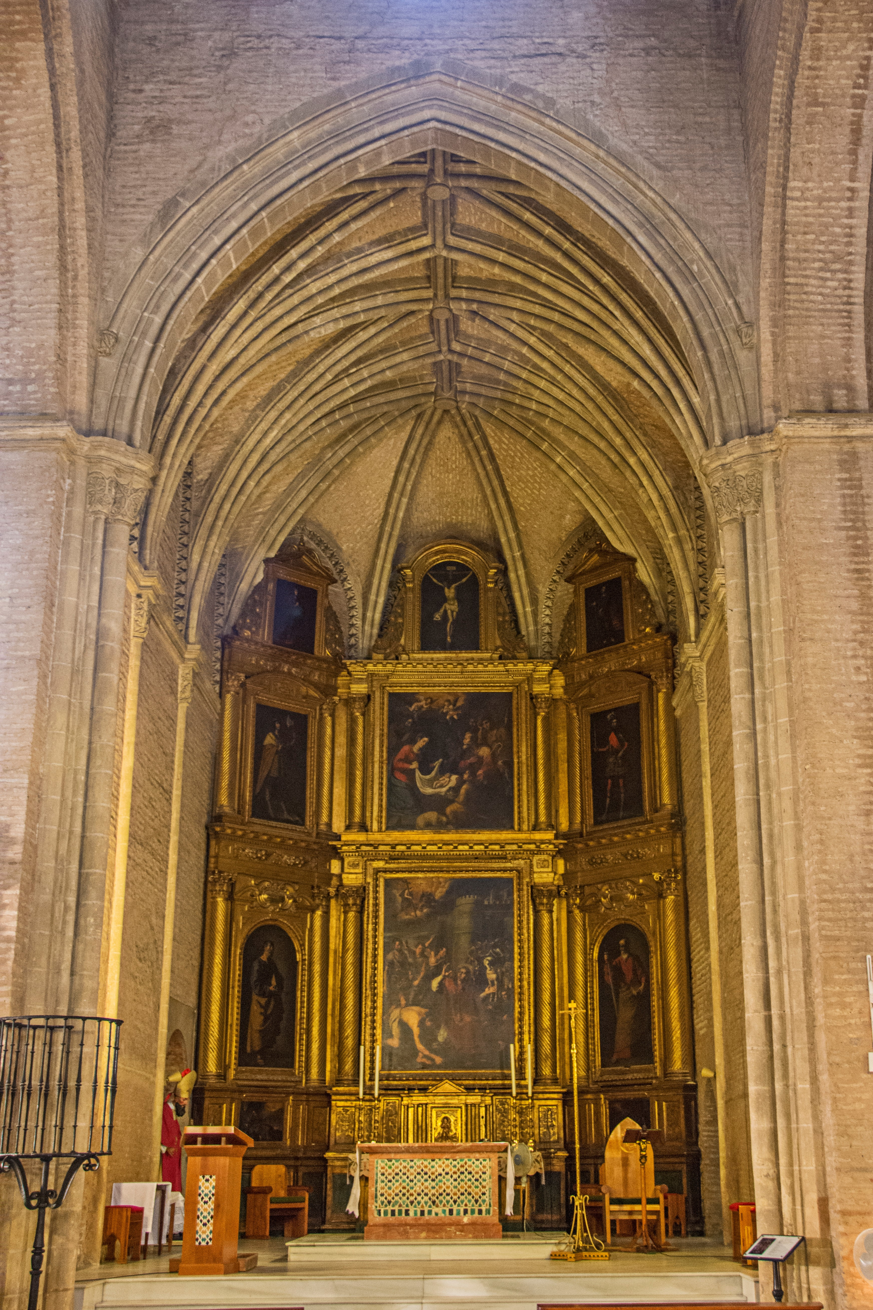 Altar mayor de la iglesia de San Esteban de Sevilla. Es obra de Luis de Figueroa, de 1629. Contiene seis lienzos de Francisco de Zurbarán (Visión de San Pedro, Conversión de San Pedro, San Pedro, San Pablo, San Hermenegildo y San Fernando) y las centrales atribuidas a los hermanos Polanco y que representan el martirio de San Esteban, la Adoración de los pastores y Cristo crucificado..